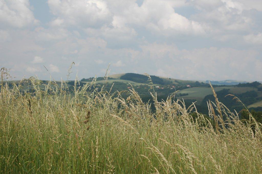 Hill